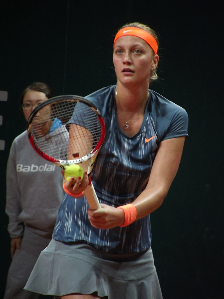 Zdjęcie zrobione podczas kobiecego turnieju tenisowego BNP Paribas Katowice Open, w katowickim Spodku.